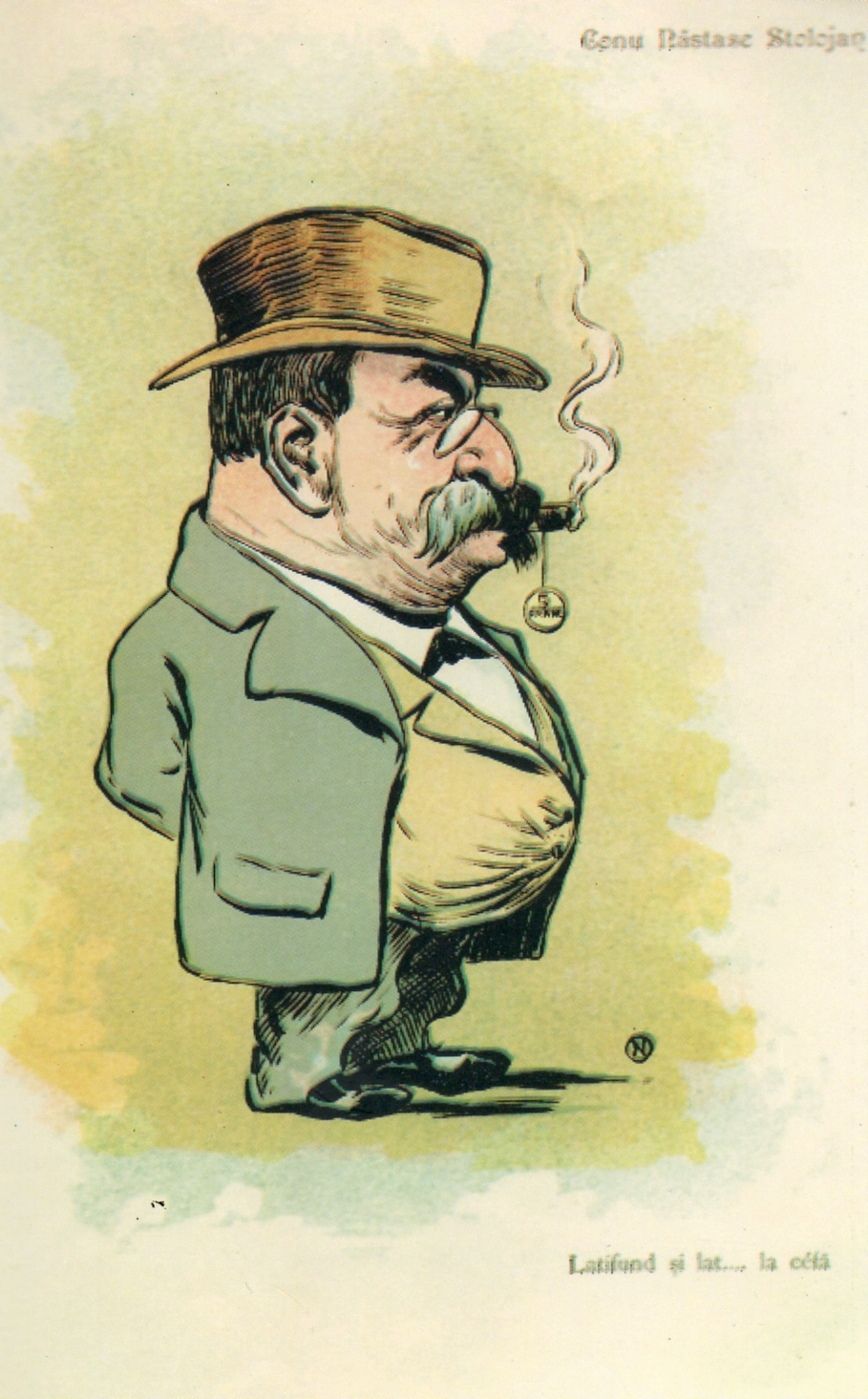 Anastase Stolojon (caricatură din Albumul Contemporani). Latifund și lat... la ceafă